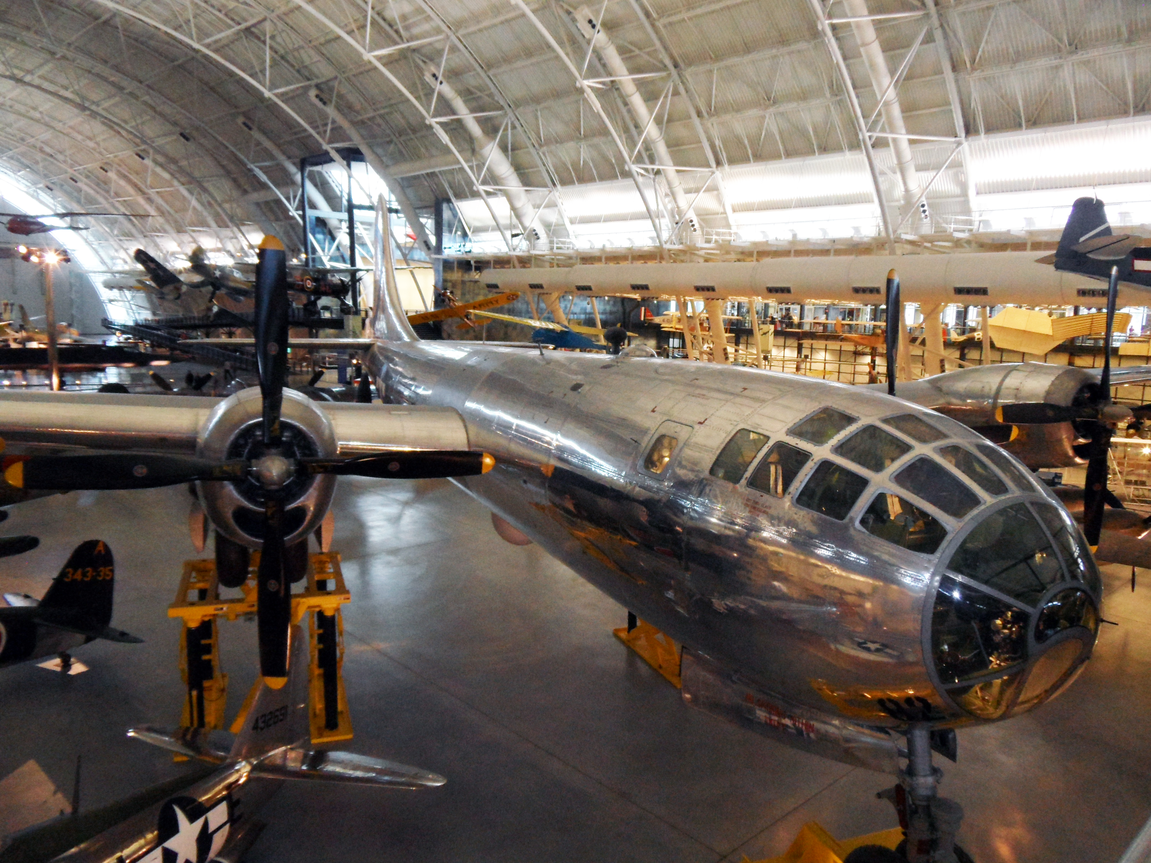 Die B-29 Superfortress Enola Gay im Steven F. Udvar-Házy, die am 6. August 1945 die erste Atombombe, die je in einem Konflikt eingesetzt wurde, auf die japanische Stadt Hiroshima abwarf.